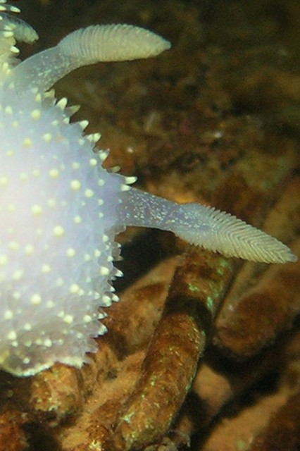 Acanthodoris hudsoni, detalle de rinóforos. Isla Vancouver, Canadá.